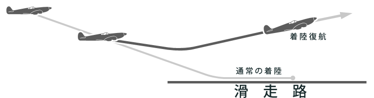 Maniobra Go-Around